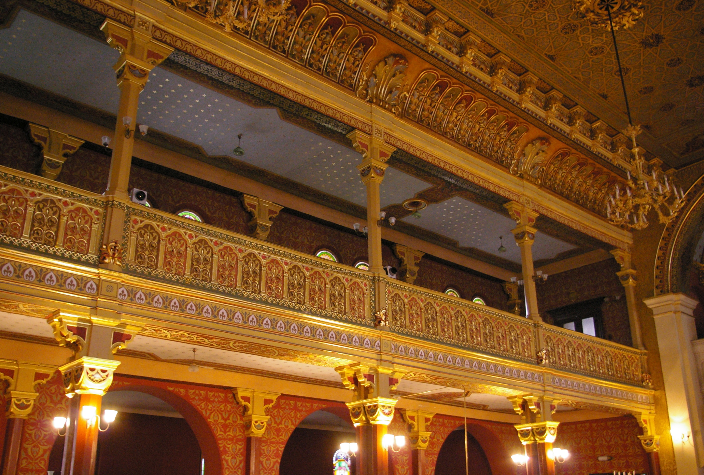 Wnętrze Synagogi Tempel w Krakowie